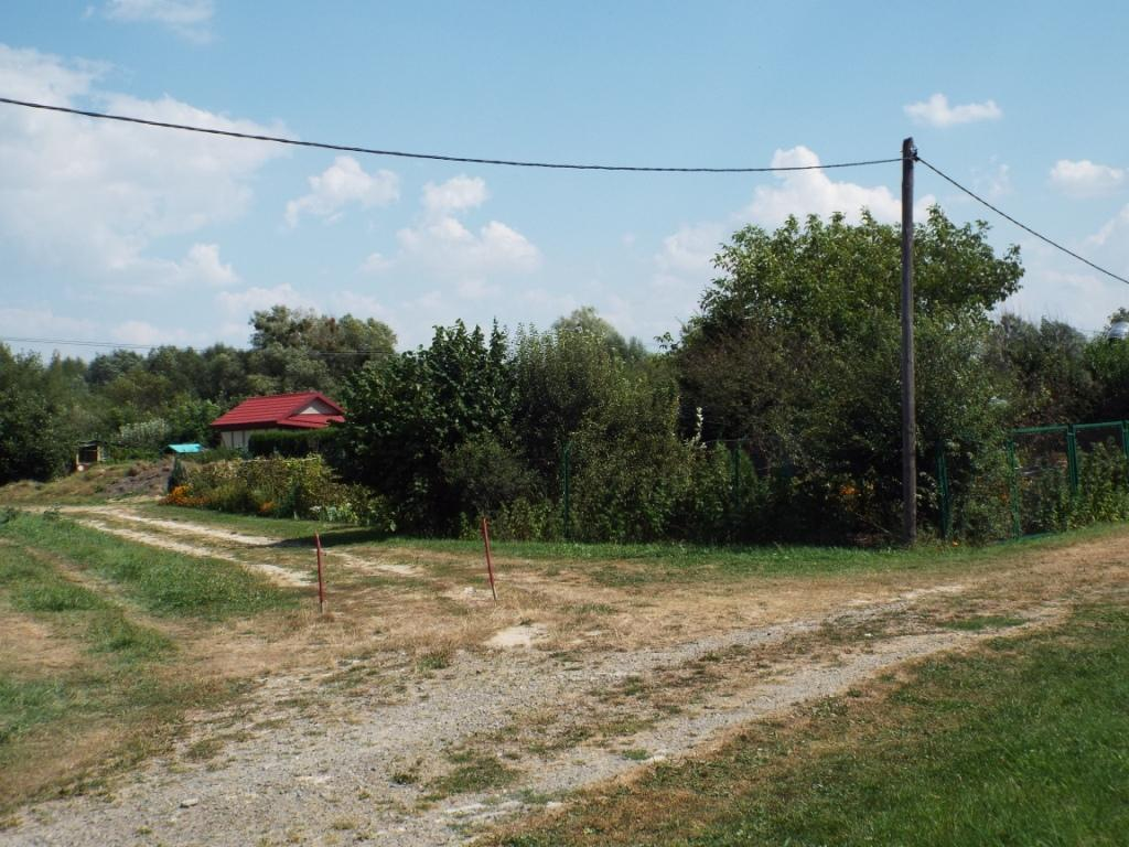 Загальний вигляд місця, де, імовірно, розташовувалося городище Щекарів. Красностав, Польща, Фото І. Парнікози, 2017 р.